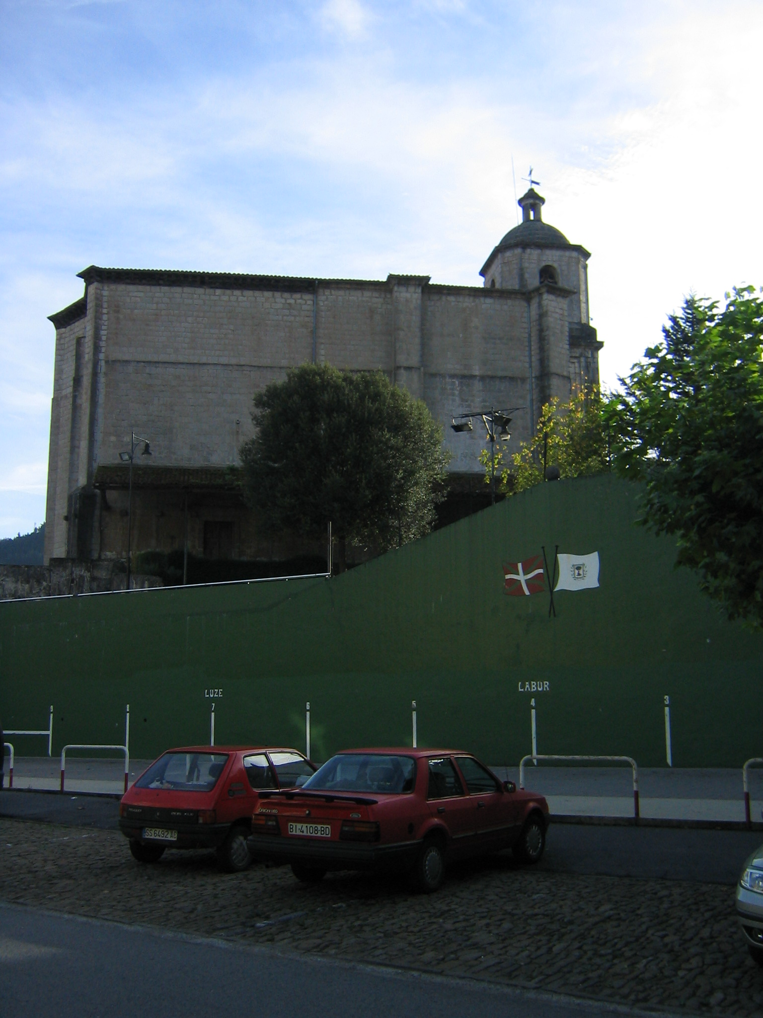 Iglesia de Berriatua, Vizcaya, País Vaco, España.